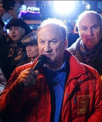 Валерий Рашкин - депутат Госдумы от фракции КПРФ в декабре 2015 года